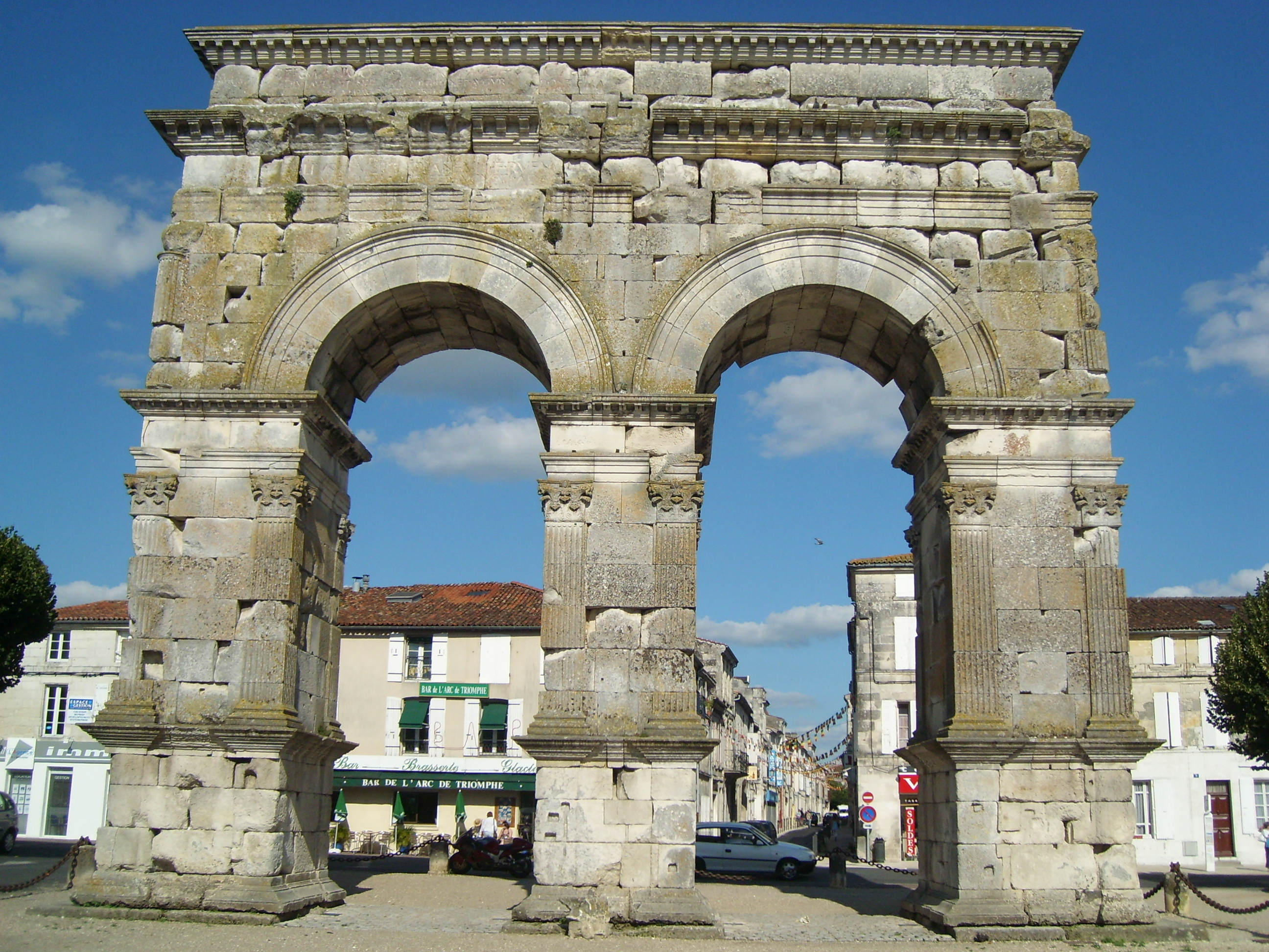 Arc de Germanicus